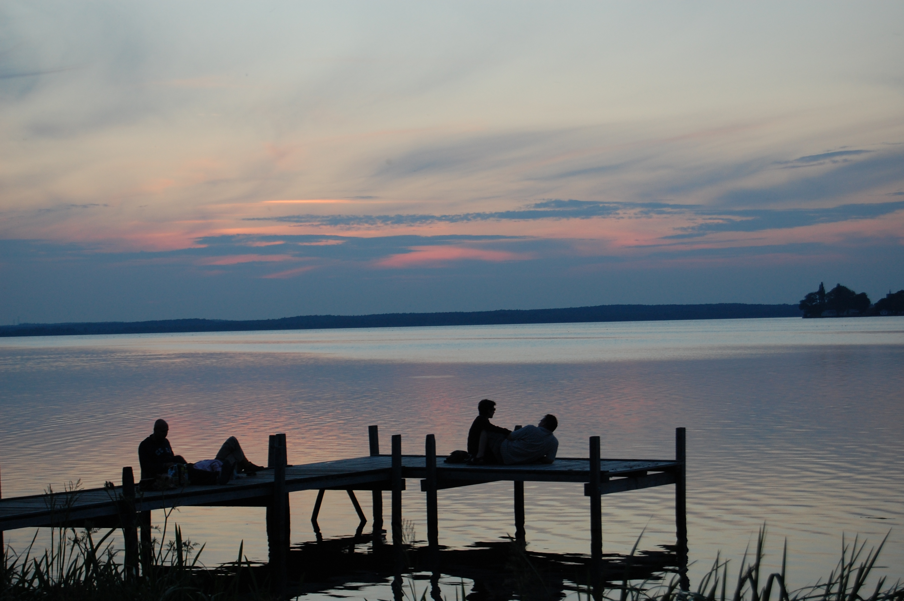 Midsümmersünn